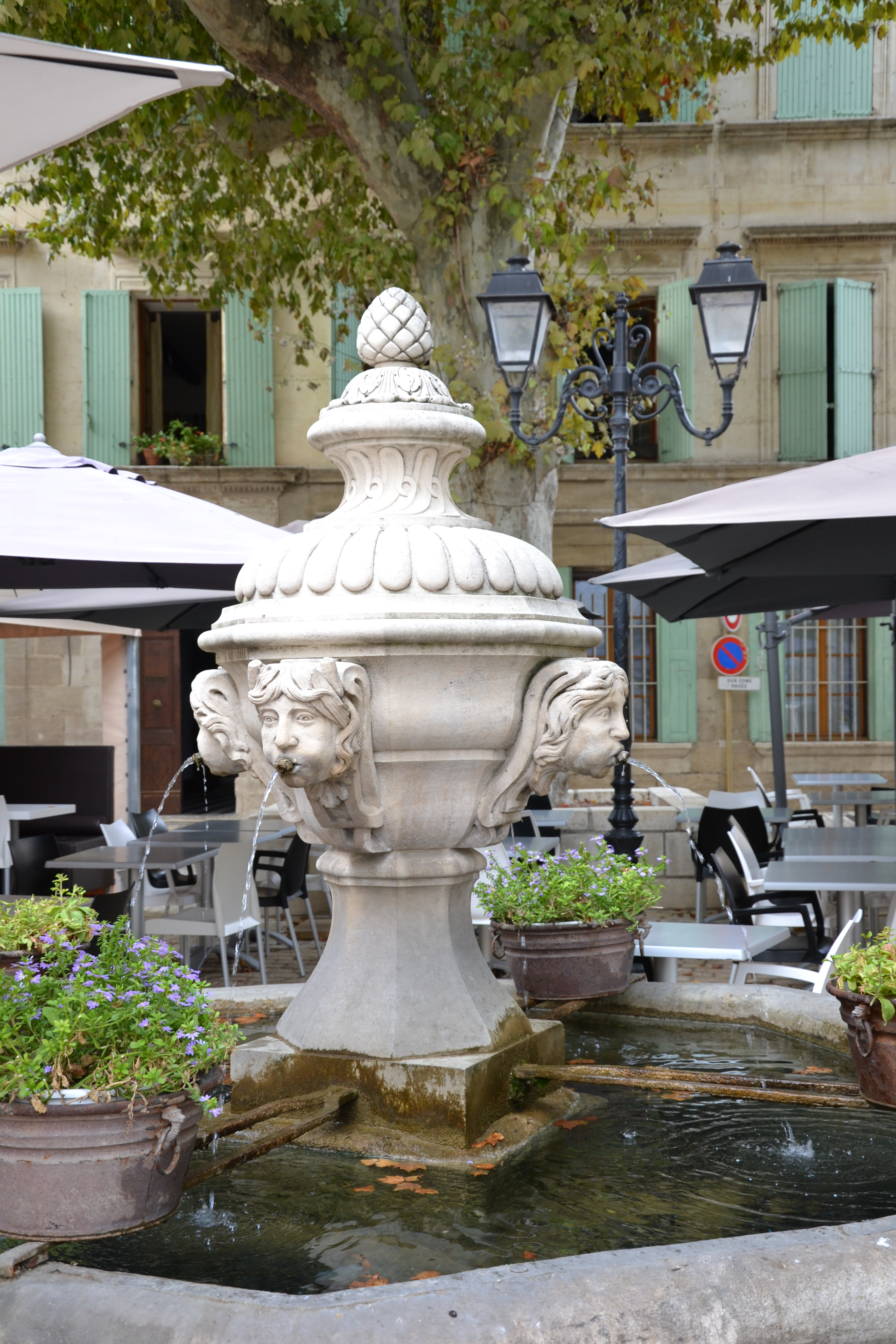 Fontaine publique d'Orange (Classé) .